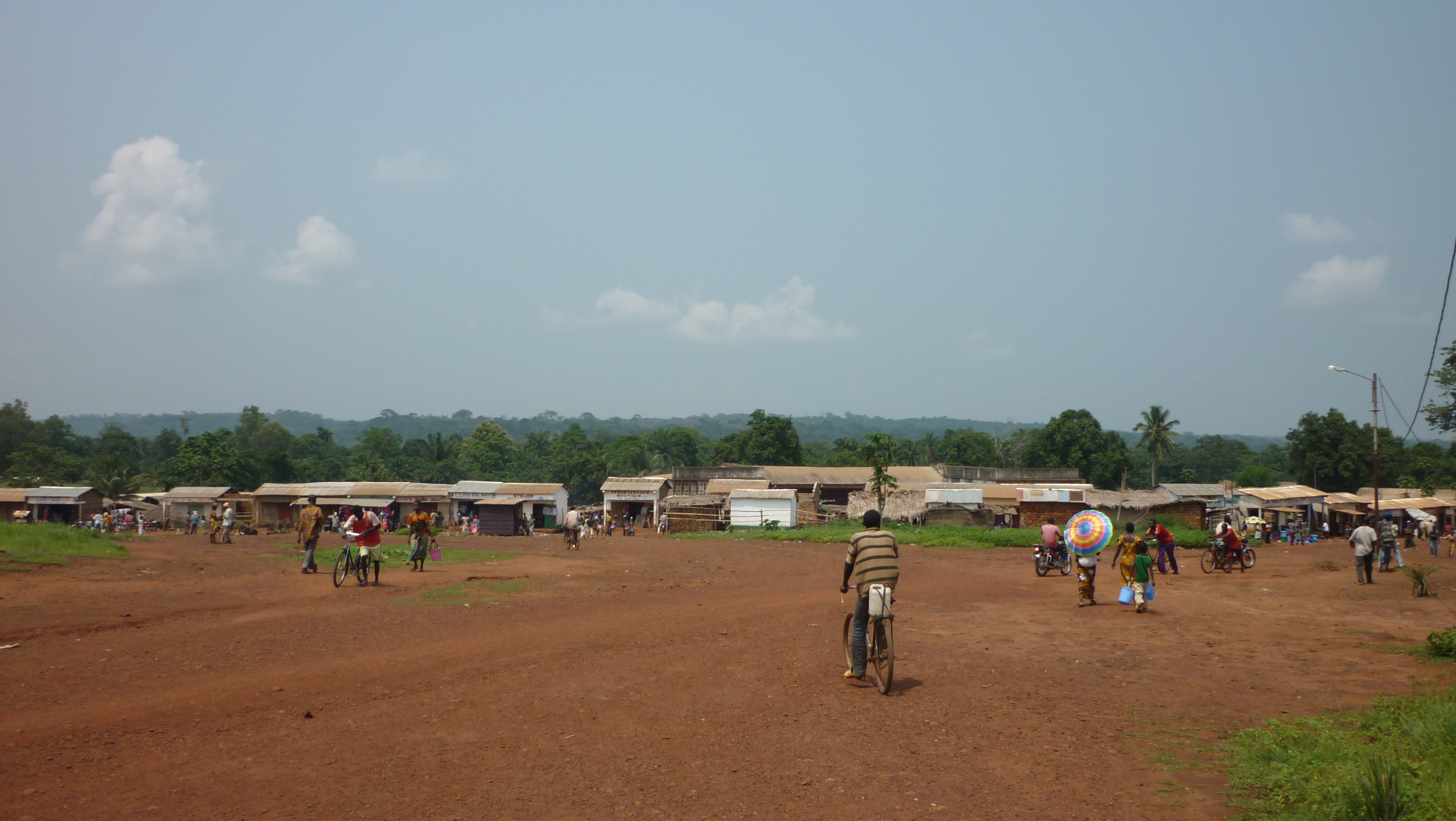 Imagen del mercado central de Bangassou (República Centroafricana), situado en el barrio de Centreville.